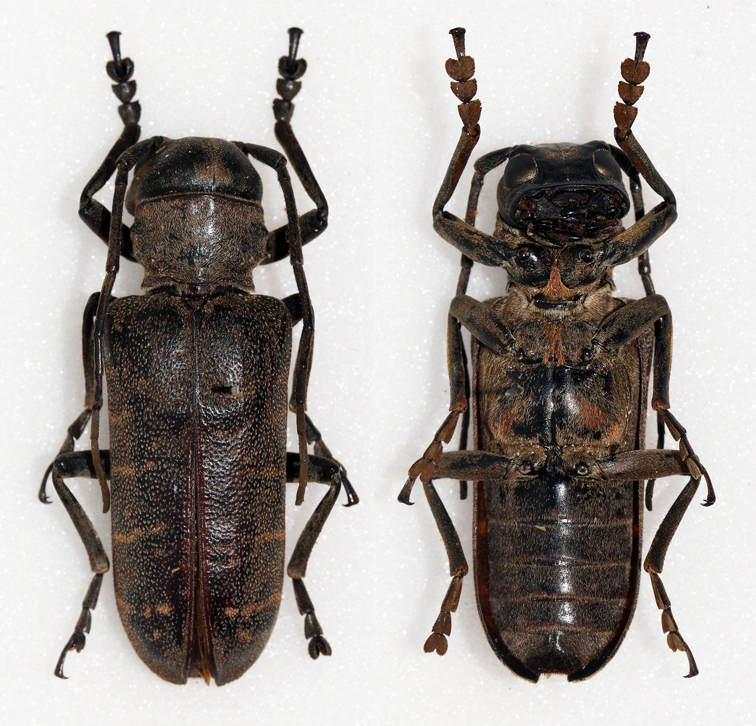 Teocchi,1997 Sex: Female Data: 06-2012 - Magadi Road - Kenya Size: 37.5mm